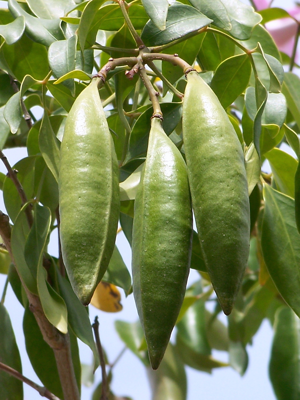 Pandorea jasminoides (Bignonia blanca) : Frutos (cápsulas) aún inmaduros - Cultivado/ornamental, Urbanización Monte Pinar, Orihuela (Provincia de Alicante, España).